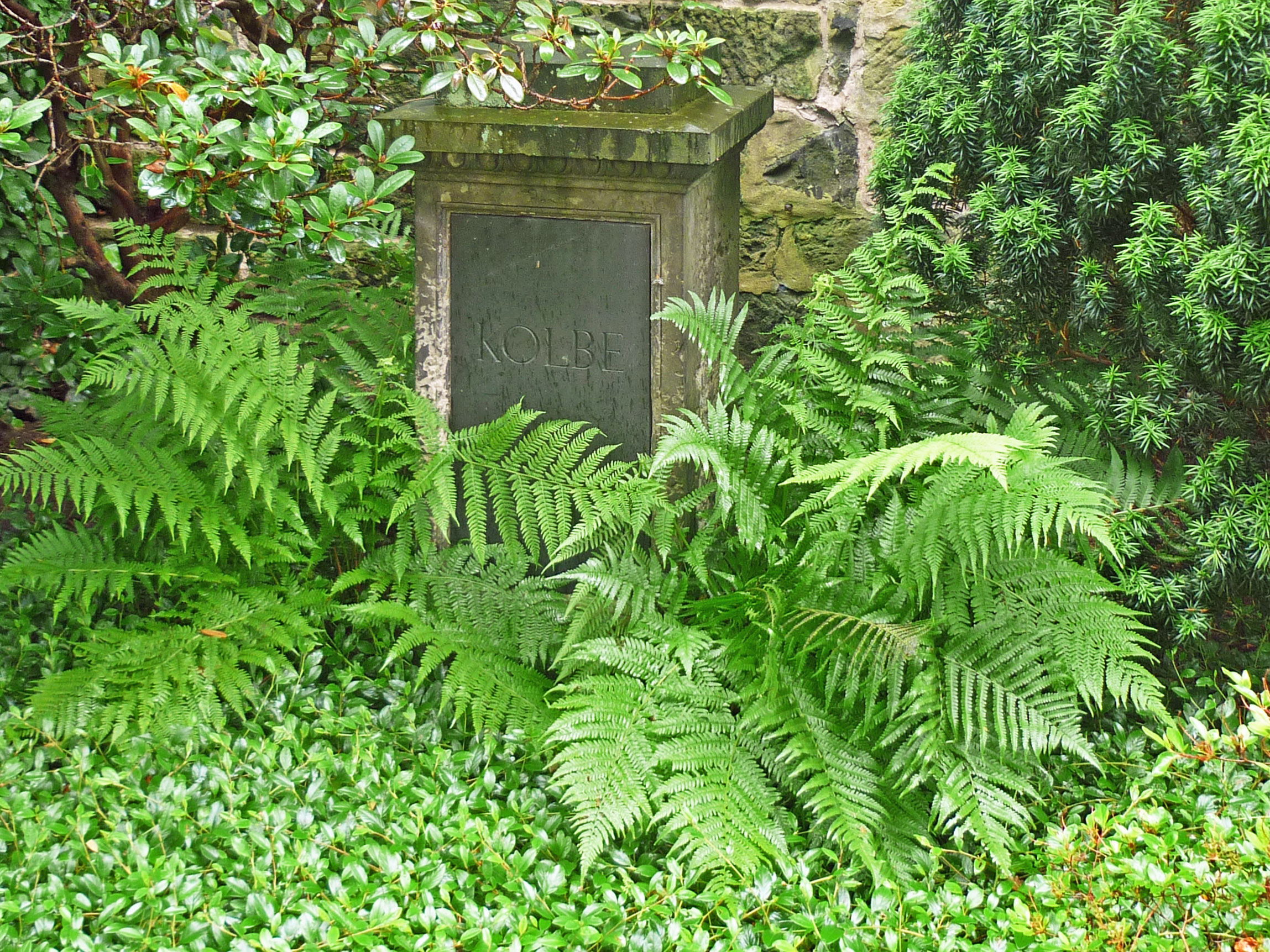 Loschwitzer Friedhof in Dresden-Loschwitz: Grabstätte Rudolf Kolbe (1873–1947), Architekt